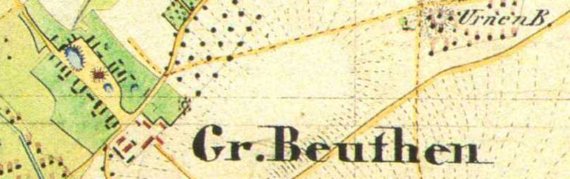 Großbeuthen auf dem Urmesstischblatt, 1:25000, Blatt Trebbin (Nr.3745) von 1840, Großbeuthen, Ortsteil von Trebbin, Brandenburg, Deutschland